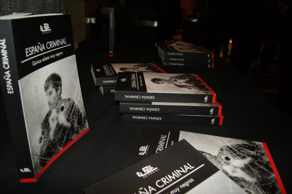 Presentación de la novela negra España criminal.